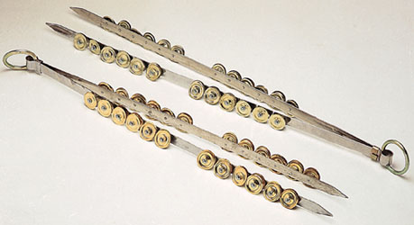 chimta